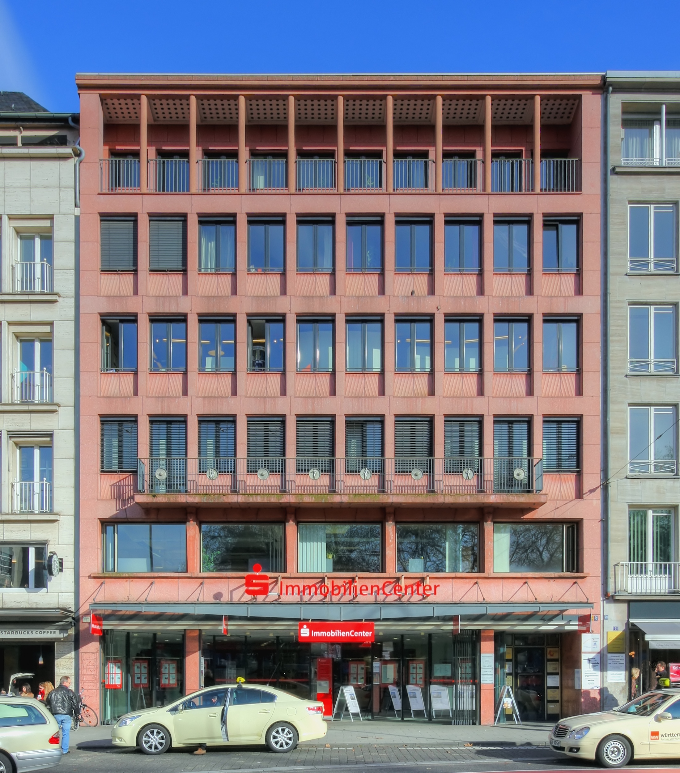 Wohn- und Geschäftshaus Neumarkt 1b, 50667 Köln. Architekten: Clemens Klotz, Hans Hagelüken. Baujahr: 1952